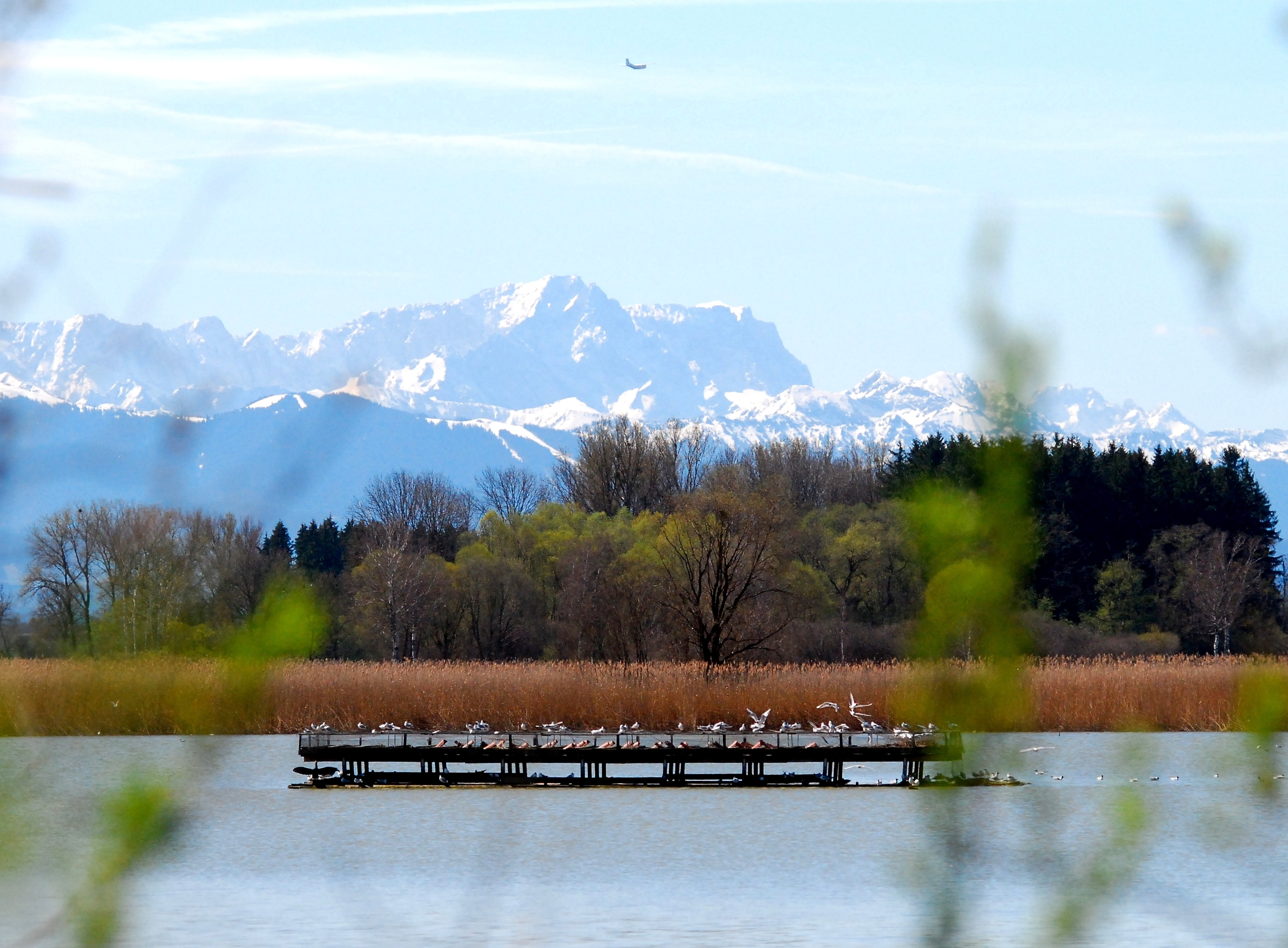 Brutfloß im Naturschutzgebiet „Vogelfreistätte Ammersee-Südufer“. Im Hintergrund das Wettersteingebirge mit der Zugspitze.